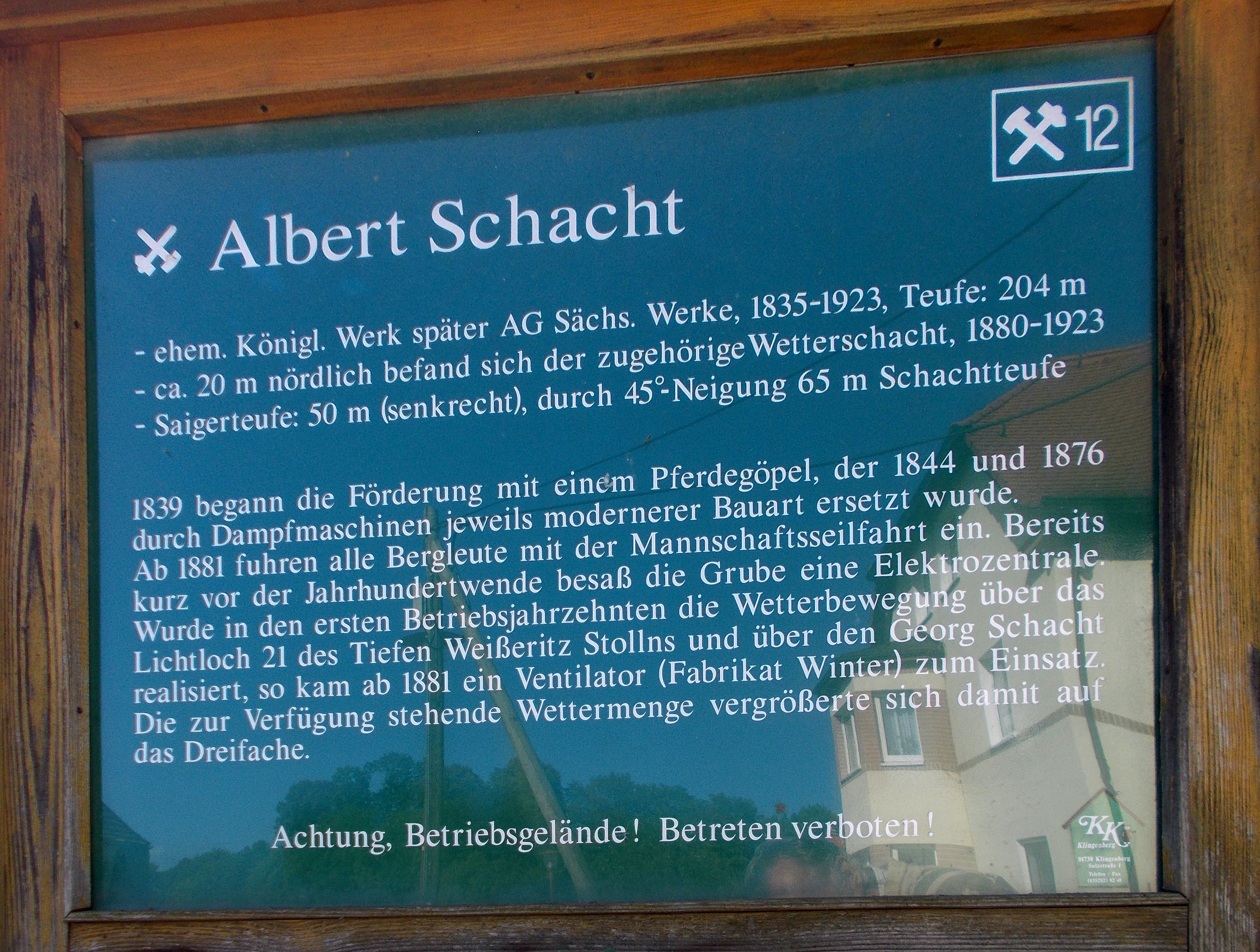 Tafel 12 des Bergbaulehrpfades in Wurgwirz